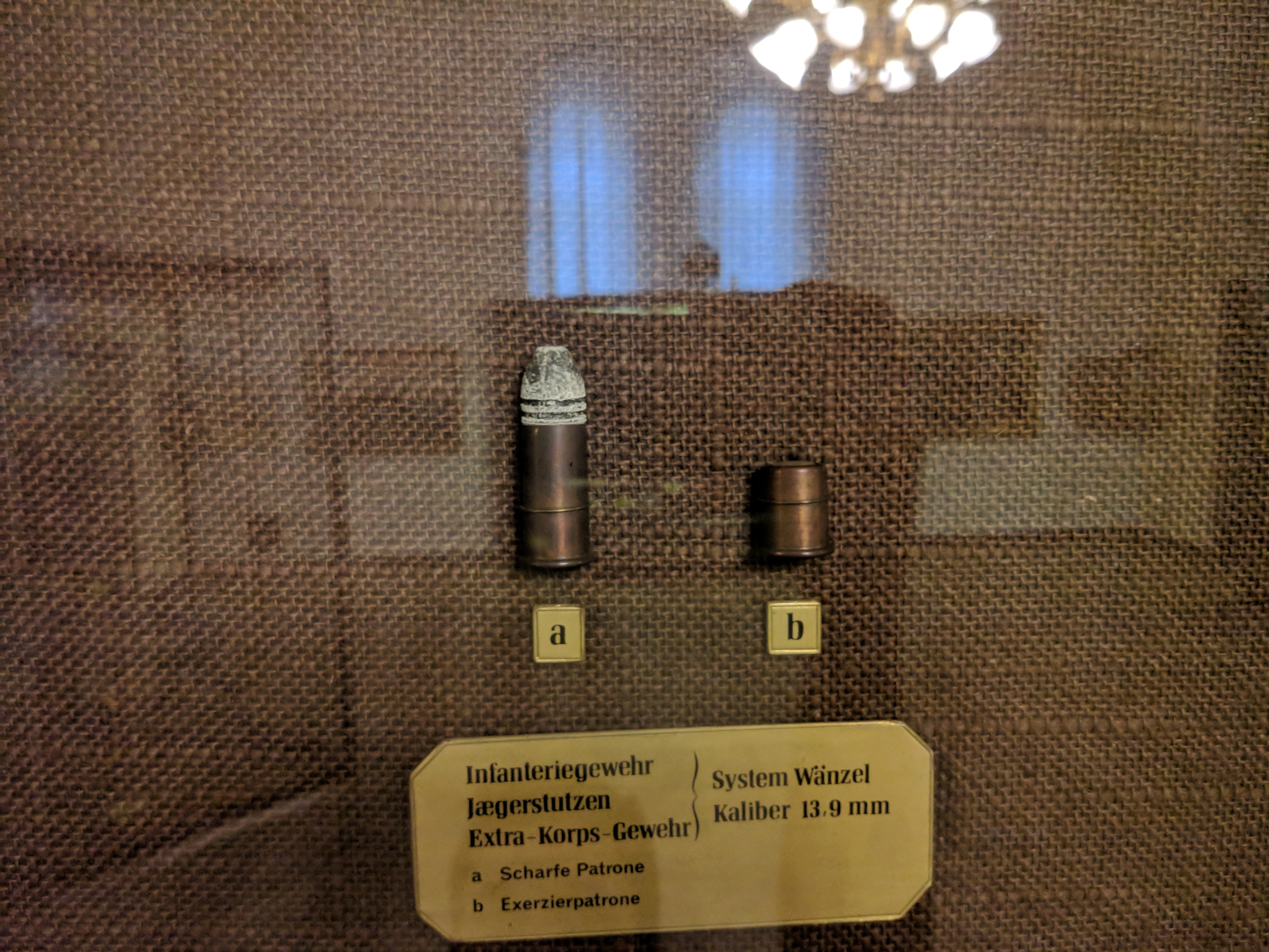 Naboja za puško Wænzl